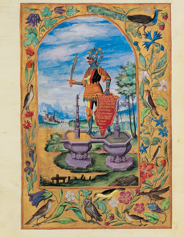 Splendor Solis - Traité d'Alchimie - Le Chevalier sur la double fontaine Fac-similé de l'exemplaire de la Bibliothèque nationale de France. Ms. All.113. XVIe siècle. 1572 env. 30 x 21 cm.